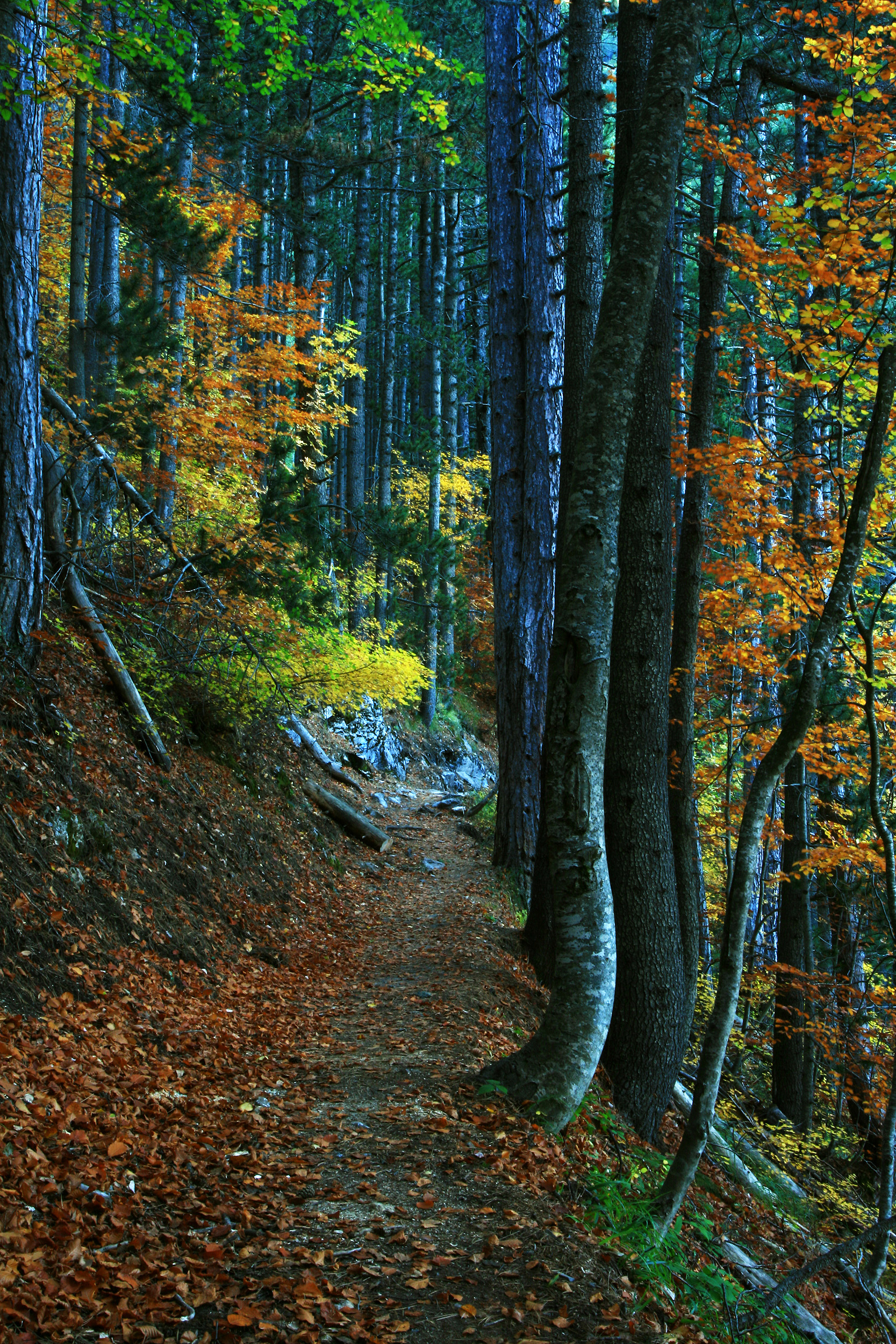 Το μονοπάτι από τα Πριόνια προς το καταφύγιο Σπήλιος Αγαπητός This is a photography of Natura 2000 protected area with ID GR1250001